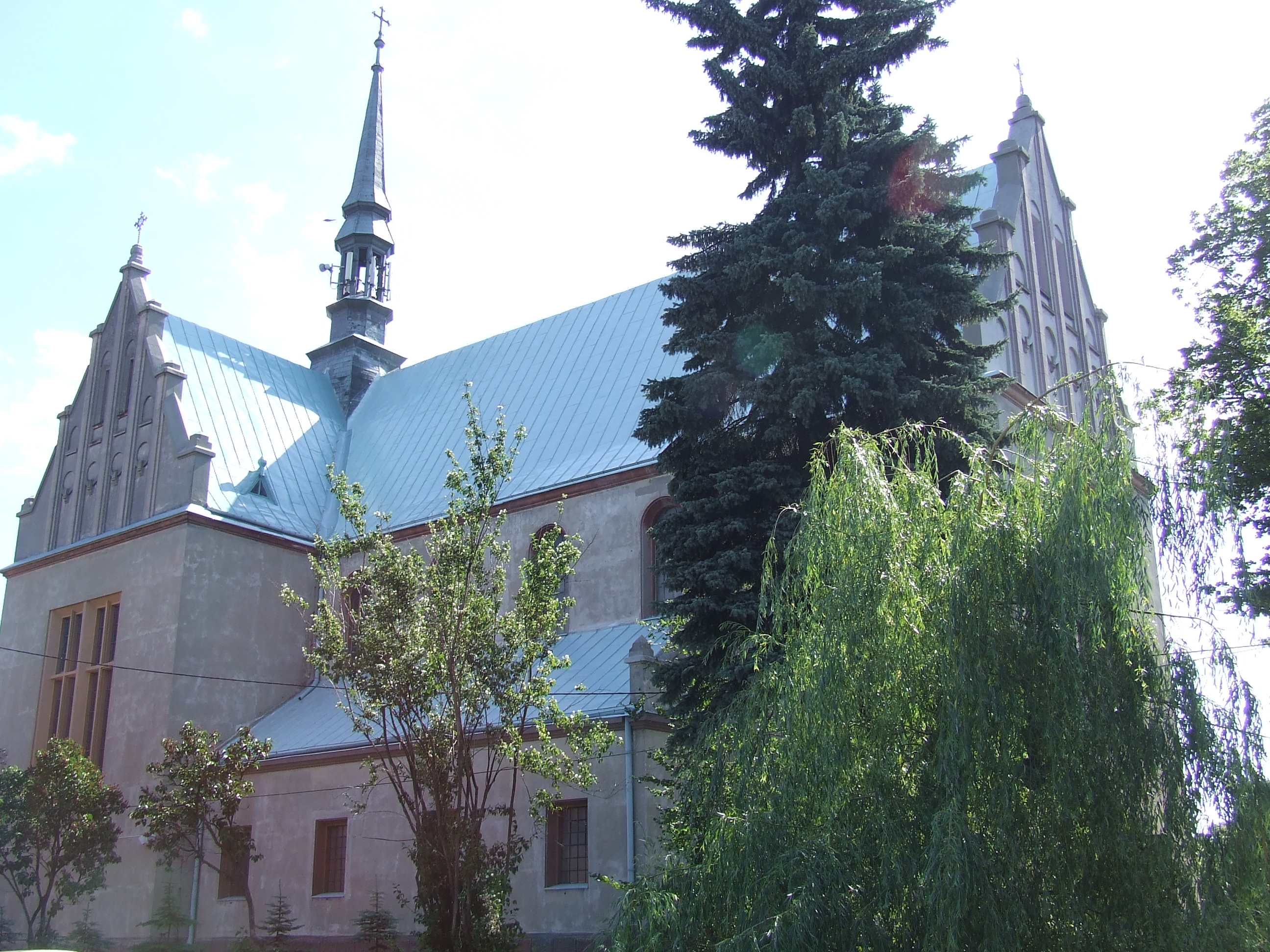 Kościół Św. Józefa w Łodzi-Rudzie, Autor: Walther, 2006